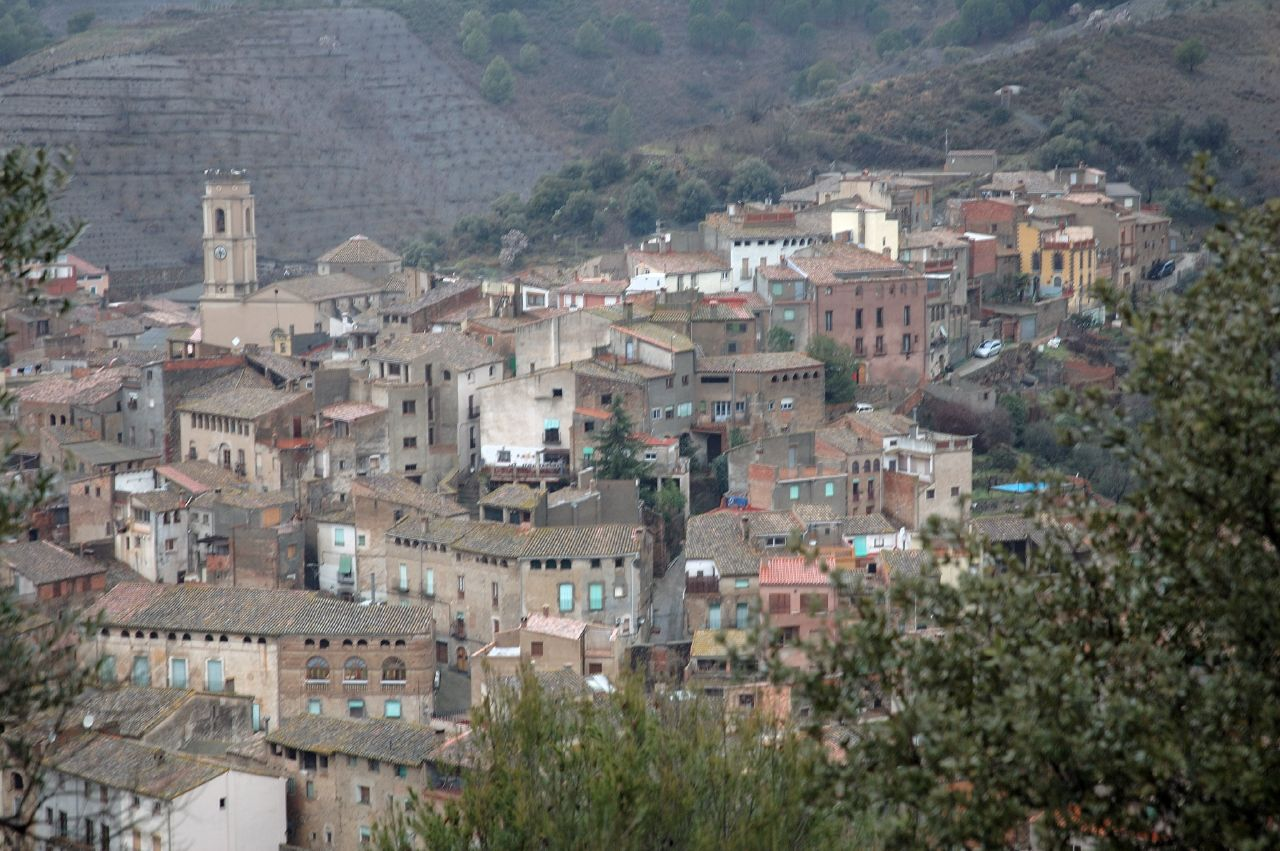 Porrera